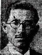 전 황해도 평의원 조동순의 1937년 사진